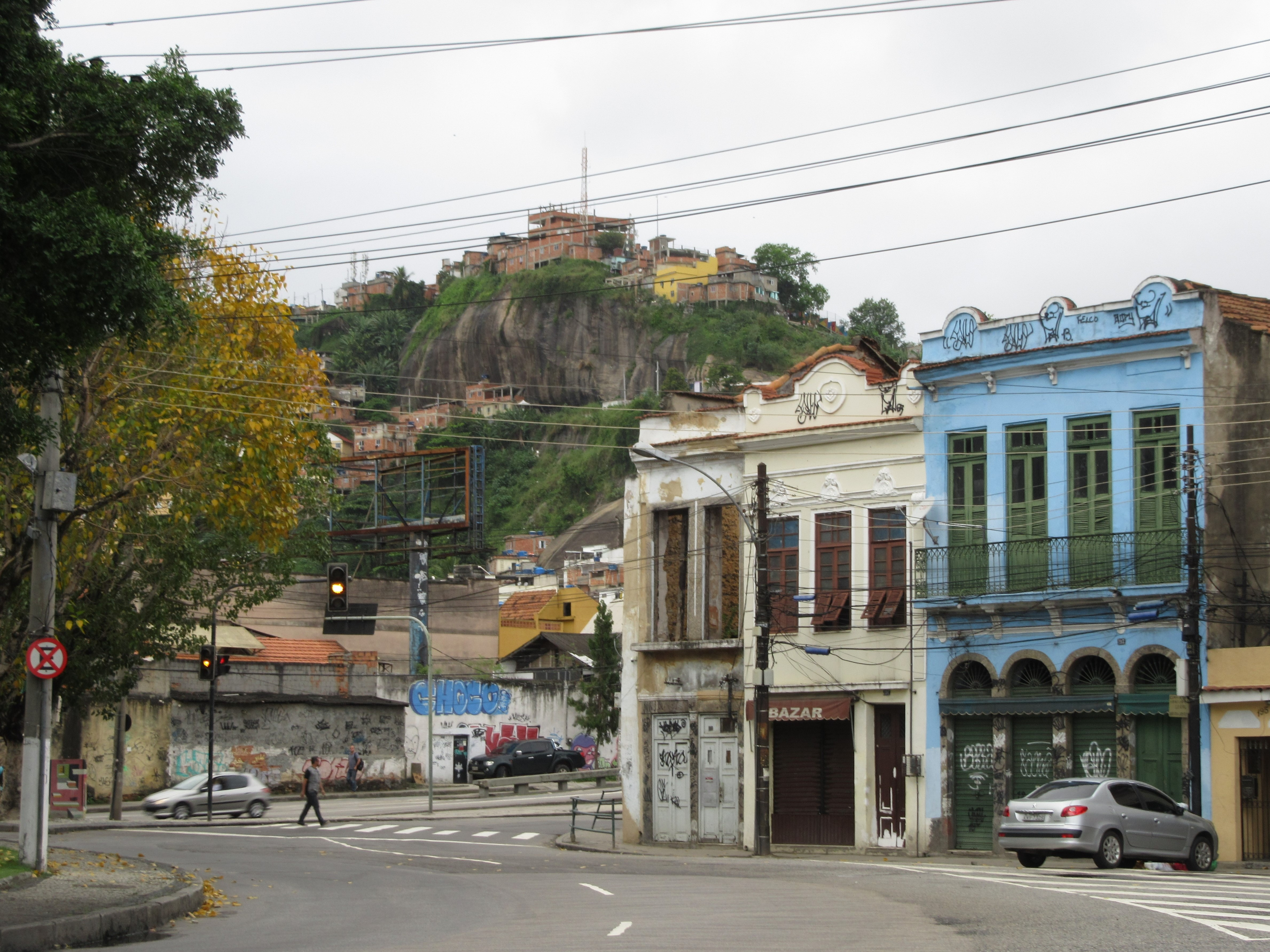 O Morro da Providência, que começou a ser ocupado em 1897, é considerado a primeira favela do Brasil. Situado entre os bairros do Santo Cristo e Gamboa, o Morro da Providência tem atualmente cerca de 5 mil moradores. (Fuente: [1])